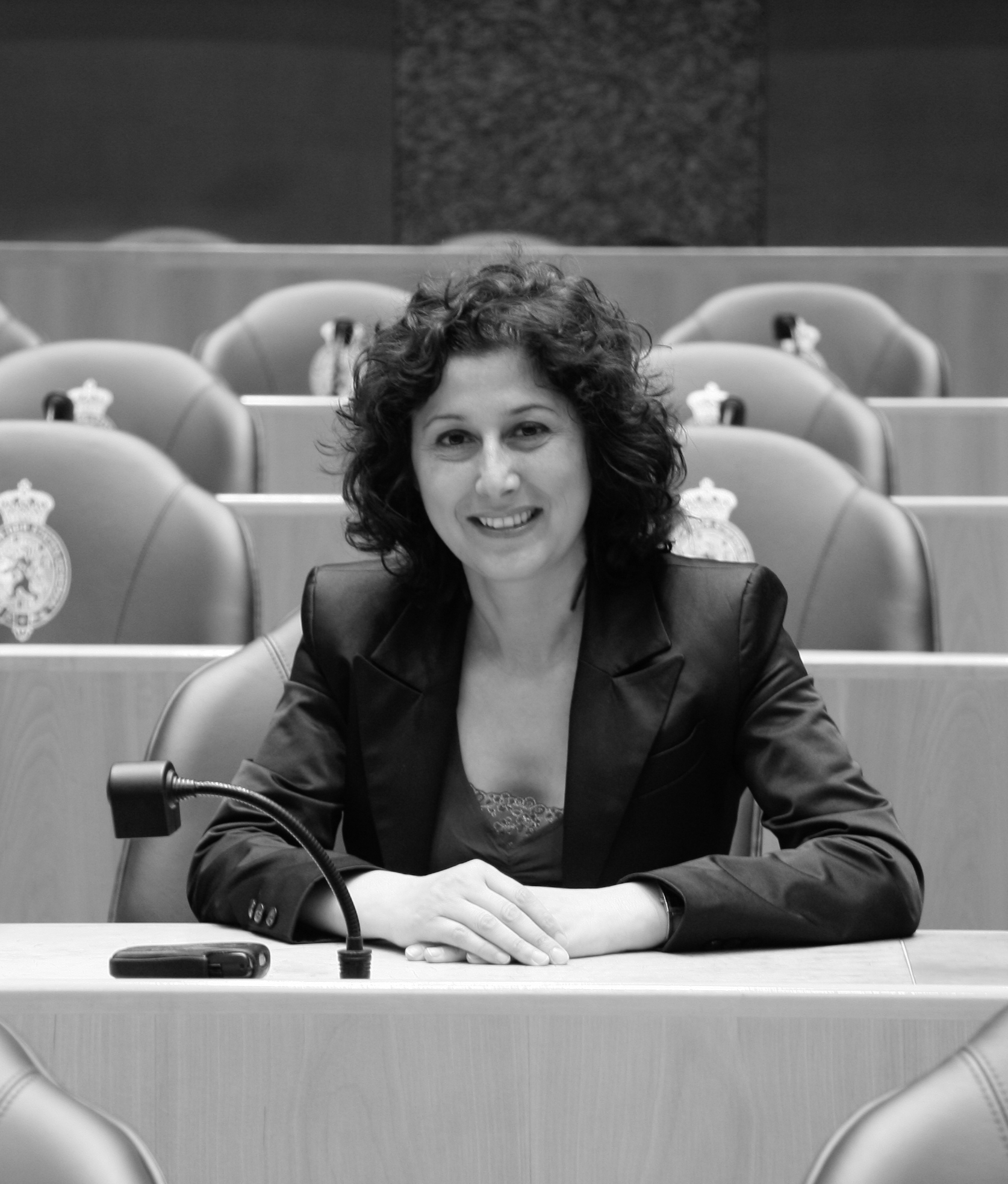 Fatma Koşer Kaya, Dutch politician